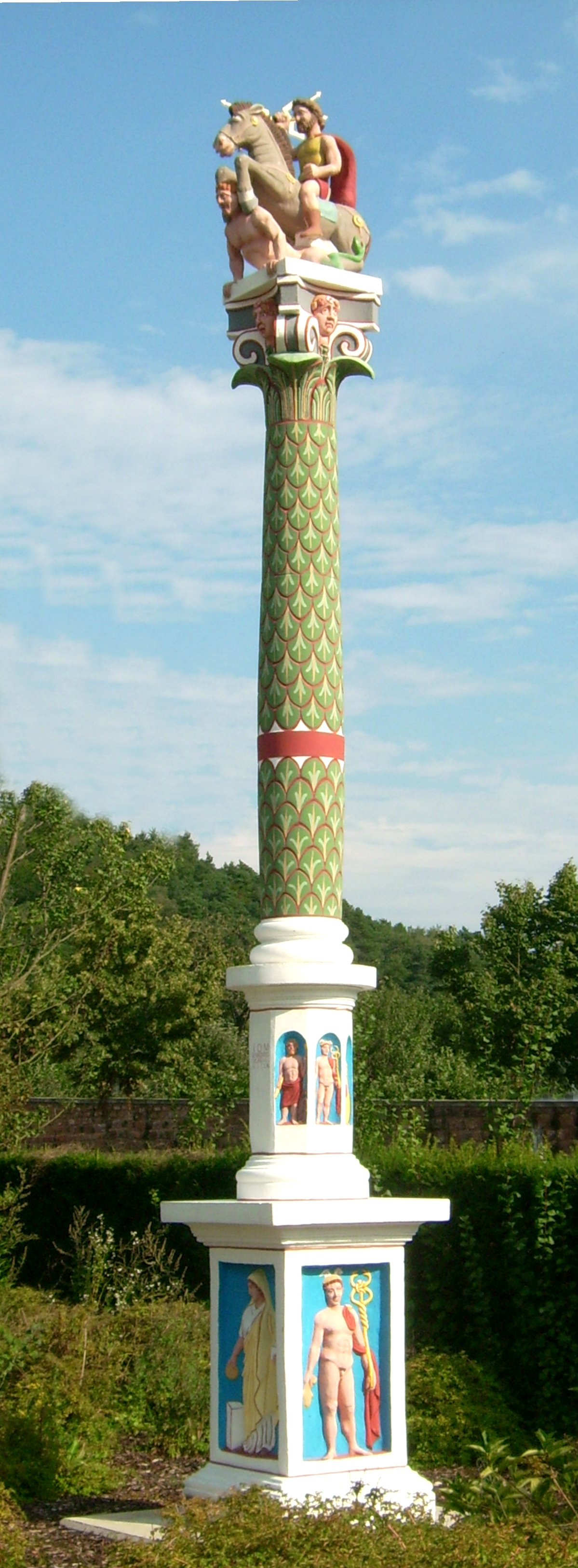 Römisch-Gallische Jupiter-Gigantensäule in Schwarzenacker, Jupiter, roman.